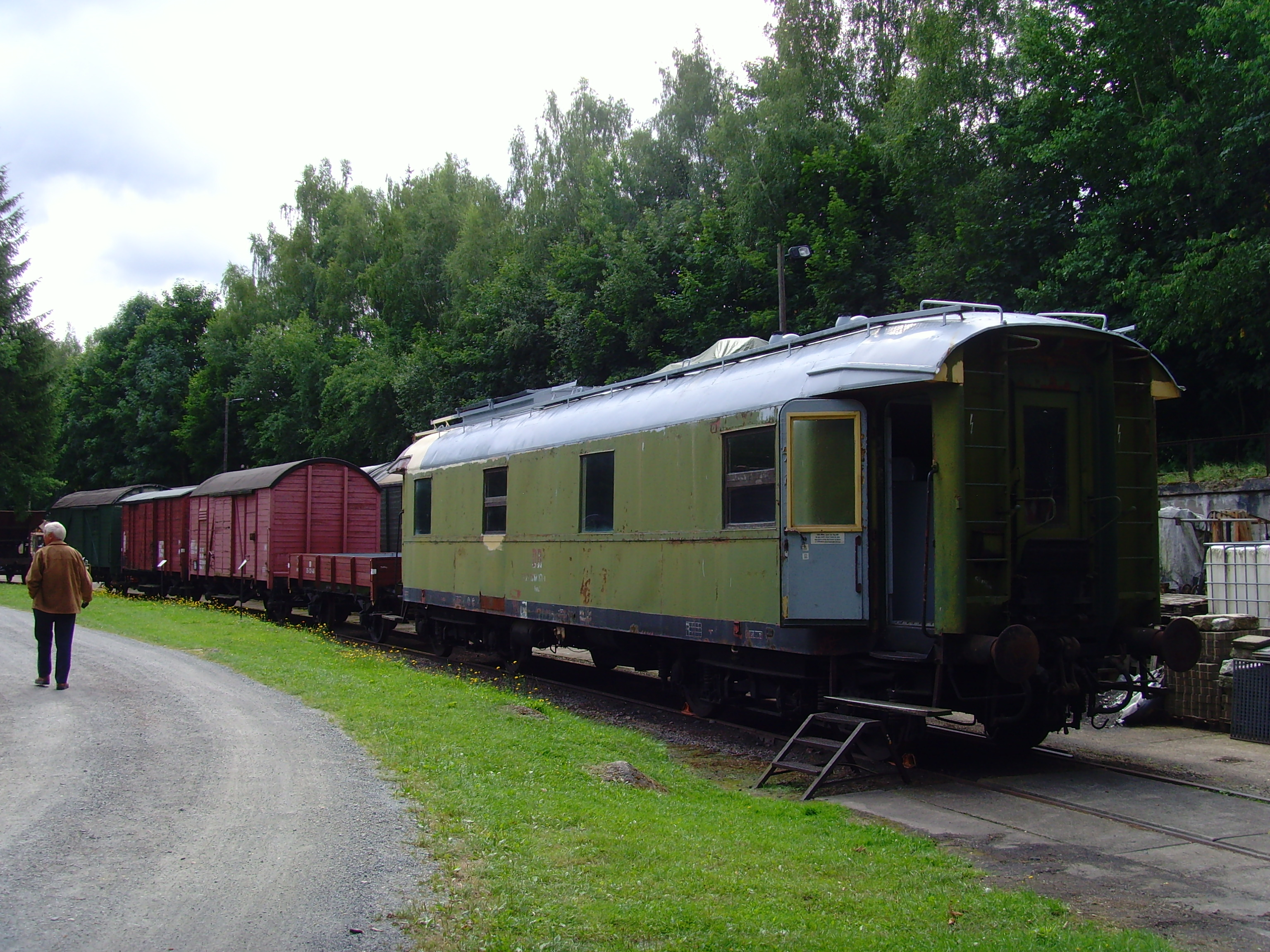 042 Eisenbahnmuseum Schwarzenberg, Heizkesselwagen